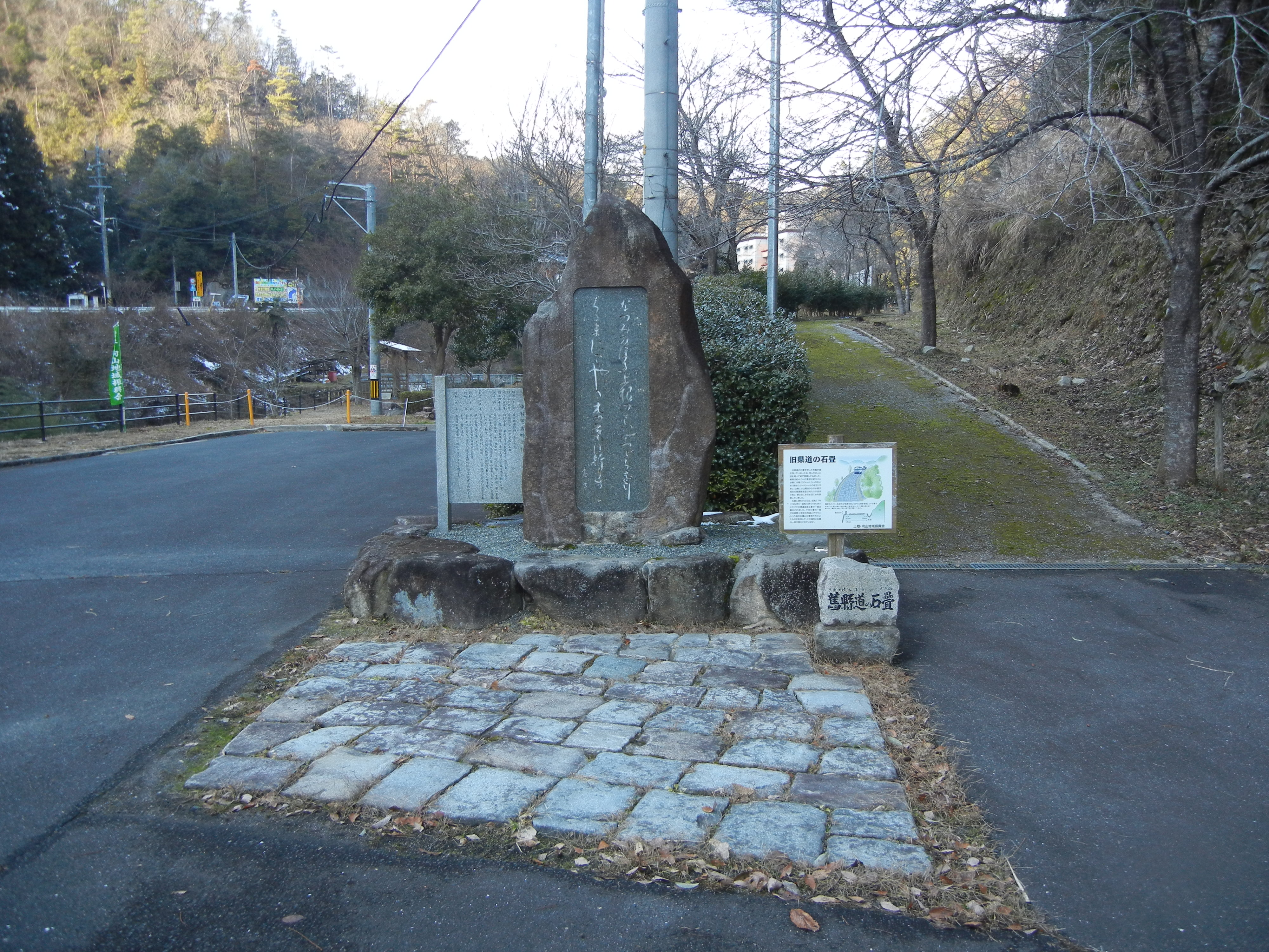 中村憲吉の歌碑と旧県道の石畳